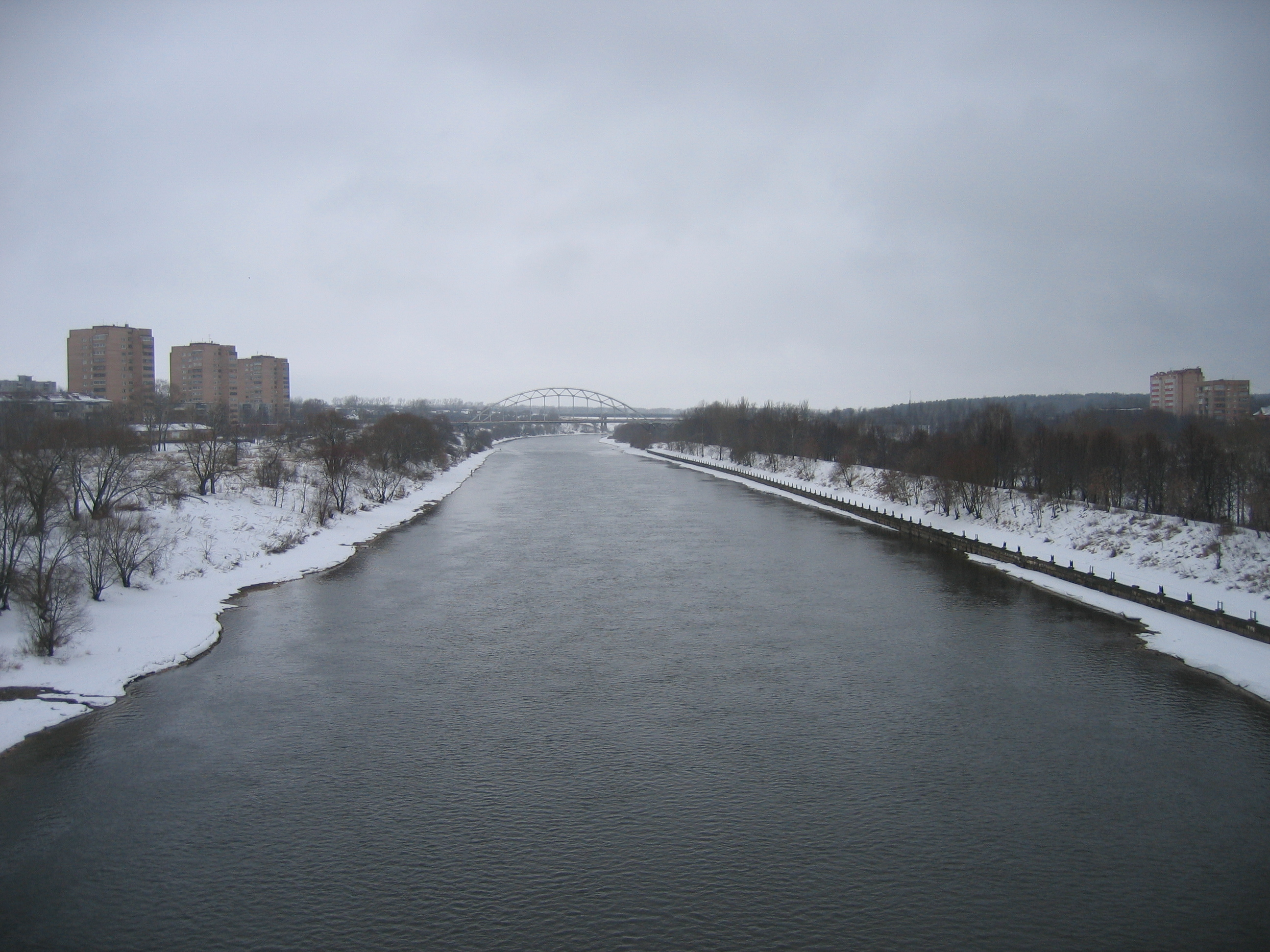 Die Moskwa in Woskressensk